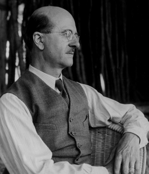 Profil de René-Maurice Gattefossé